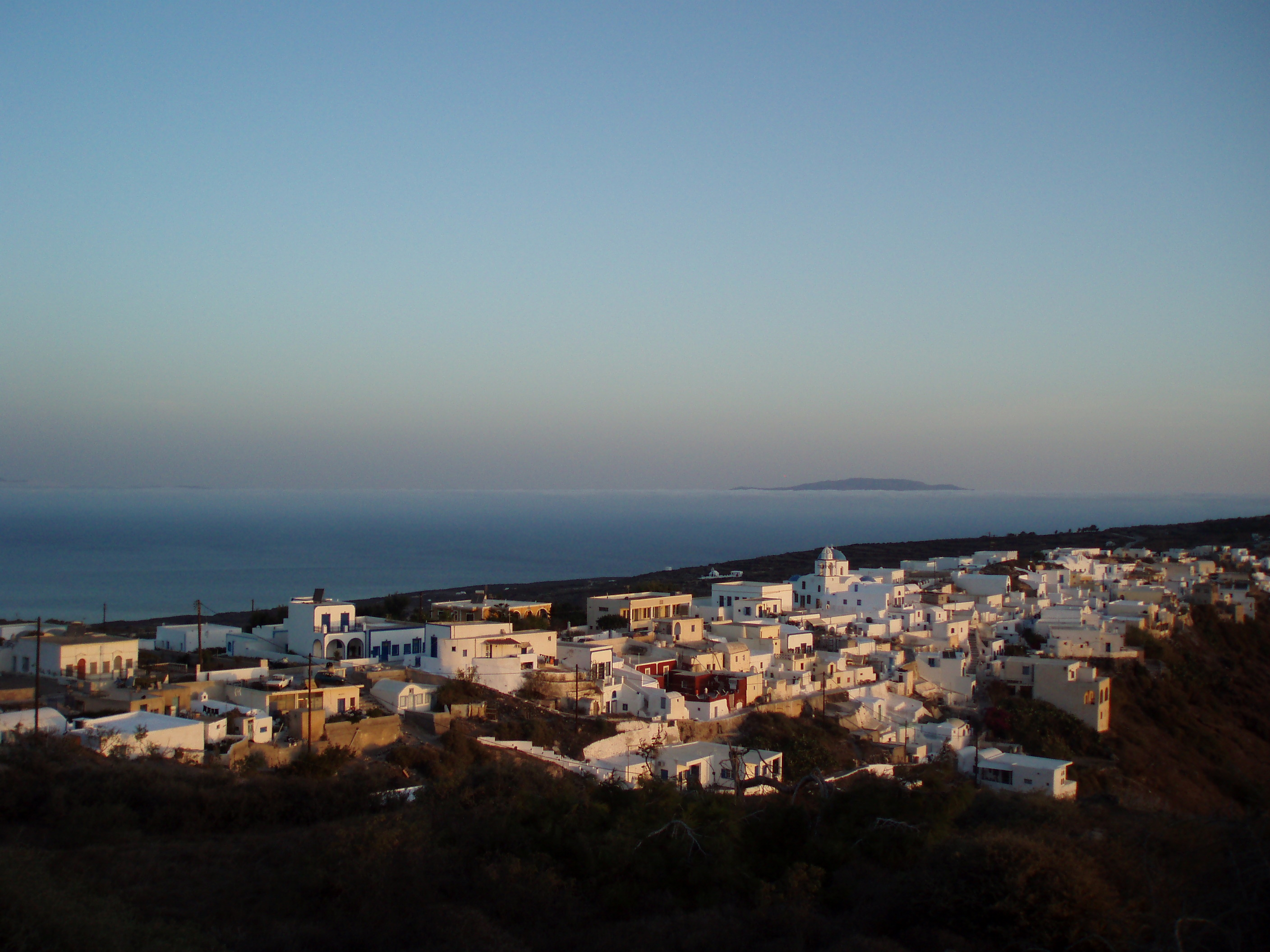 Ο Μανωλάς